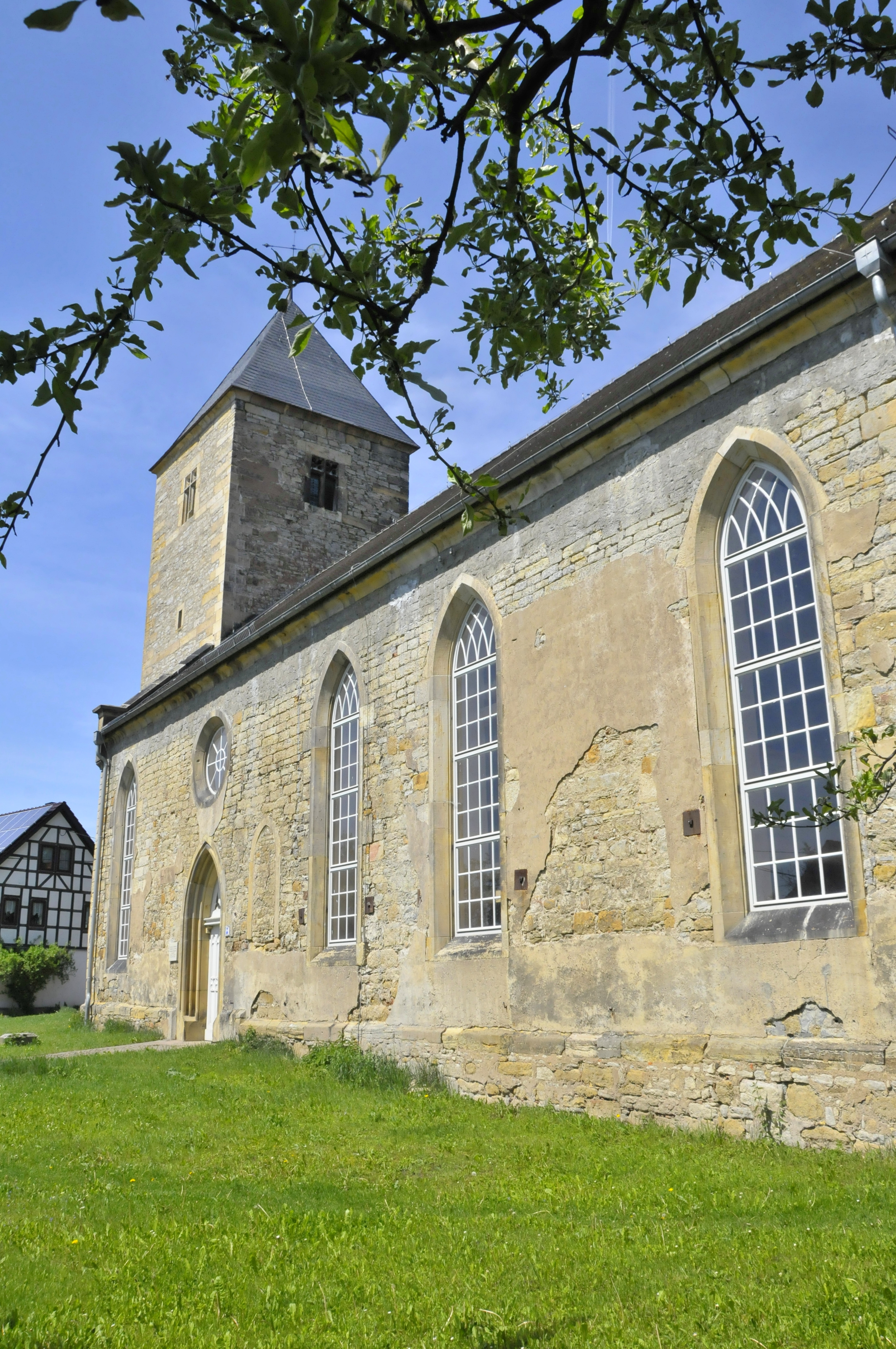 Die Dorfkirche St. Ulrich oder auch Ulrichskirche (von 1510) im Erfurter Ortsteil Alach - Thüringen, Deutschland.